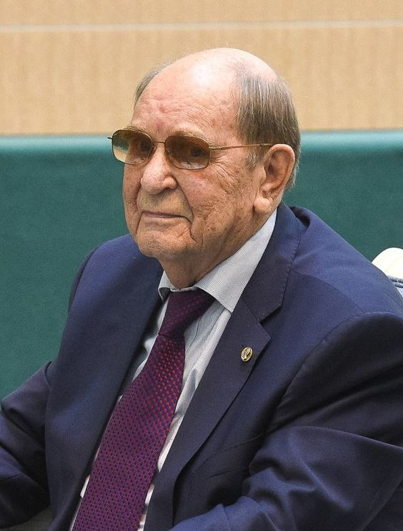 Александр Сергеевич Исаев, председатель научного совета по лесу Российской академии наук, академик РАН Александр Исаев